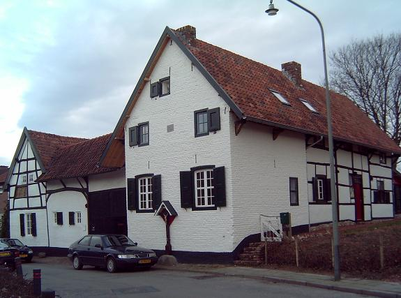 Limburgs: Hobbelder Hobbelrade vakwerkhaof